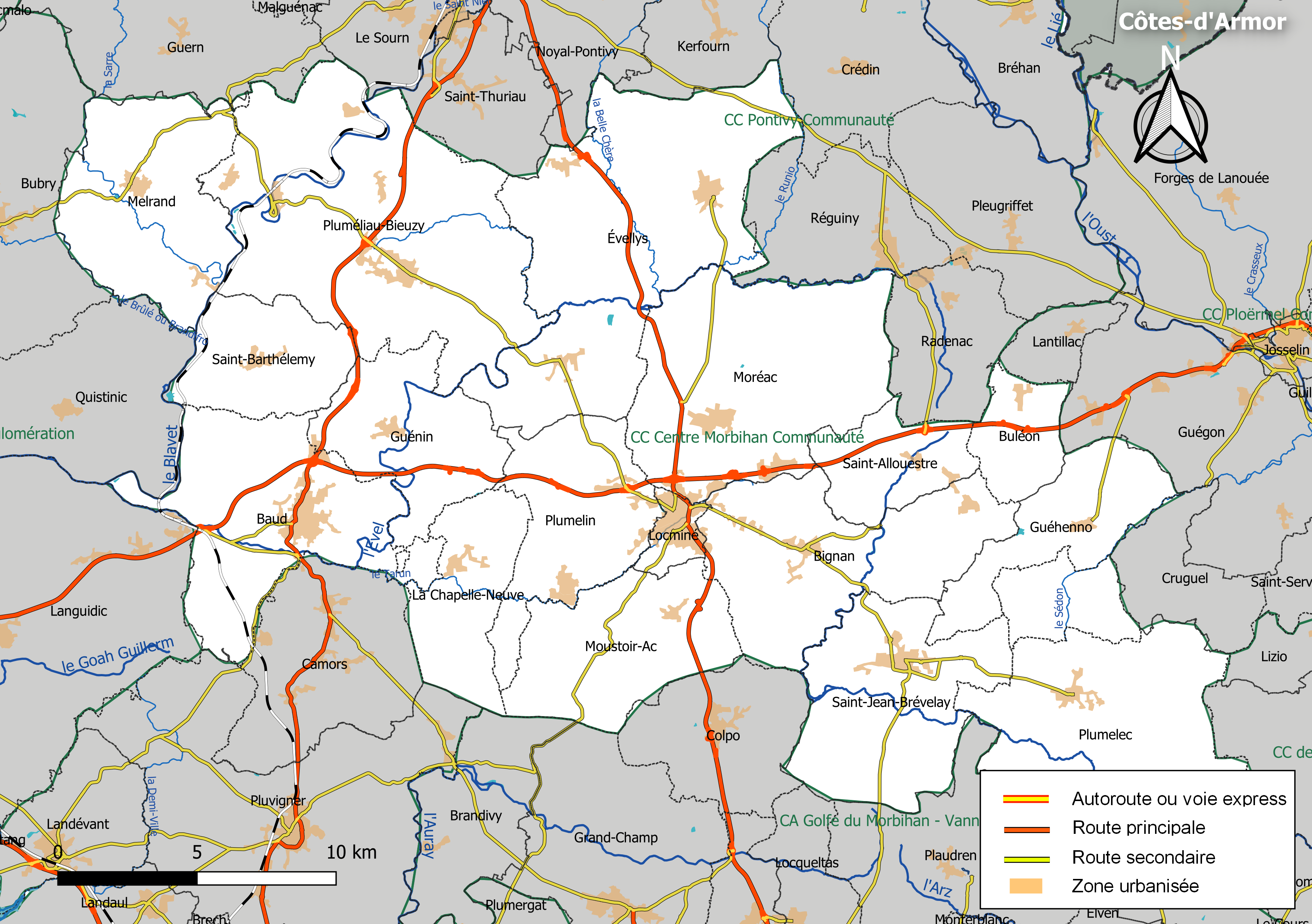 Carte géographique de la Communauté de communes Centre Morbihan Communauté, département du Morbihan, France. Composition au 1er janvier 2019.